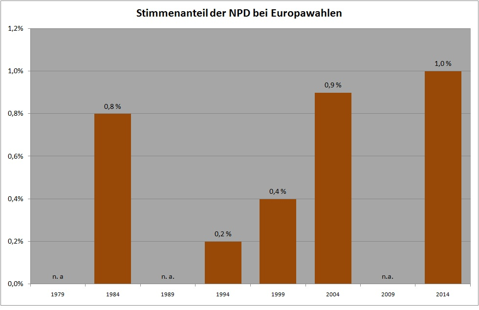 Europawahlergebnisse der NPD 1984 bis 2004